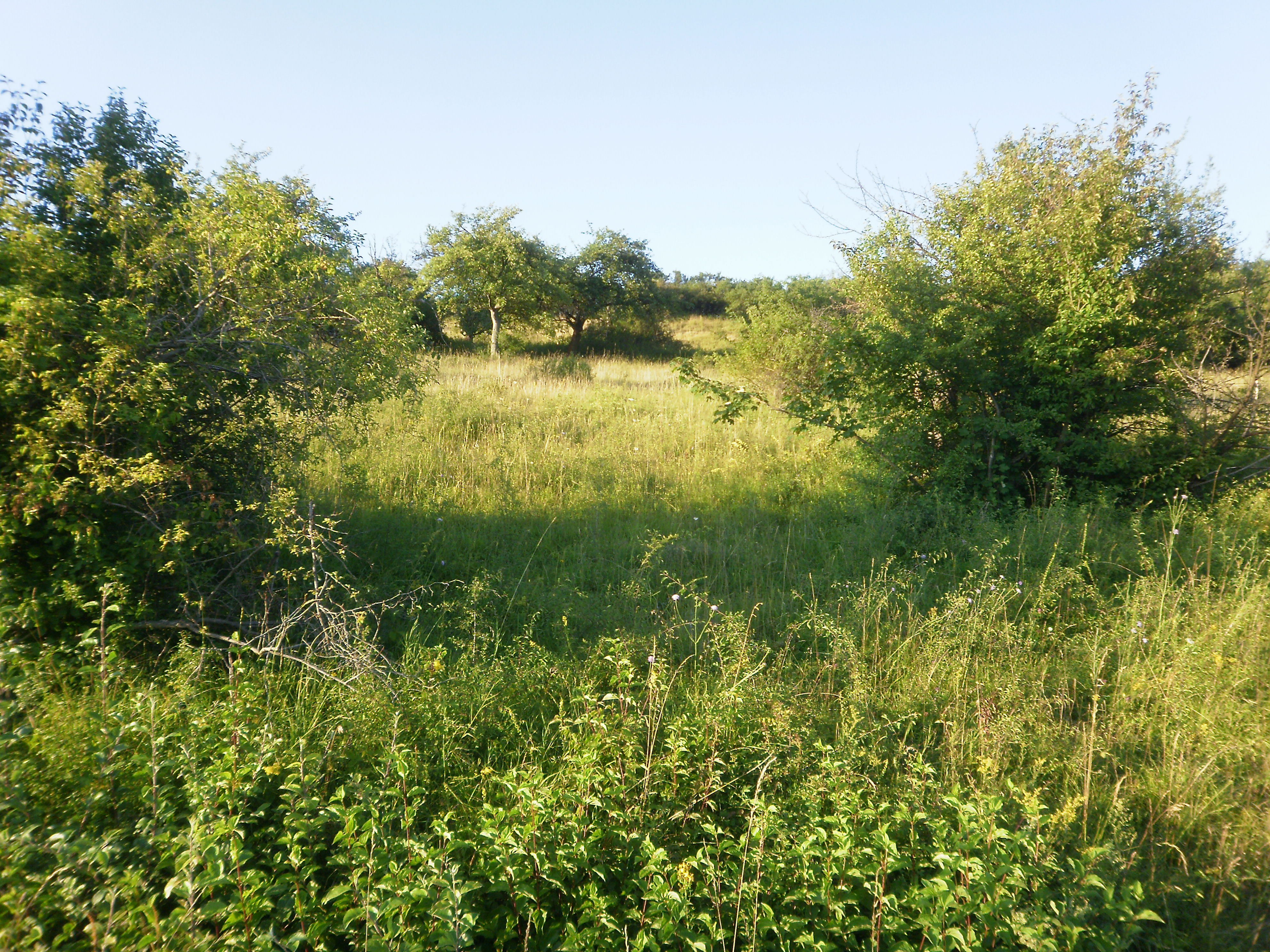 Naturschutzgebiet Keischel im Landkreis Kassel